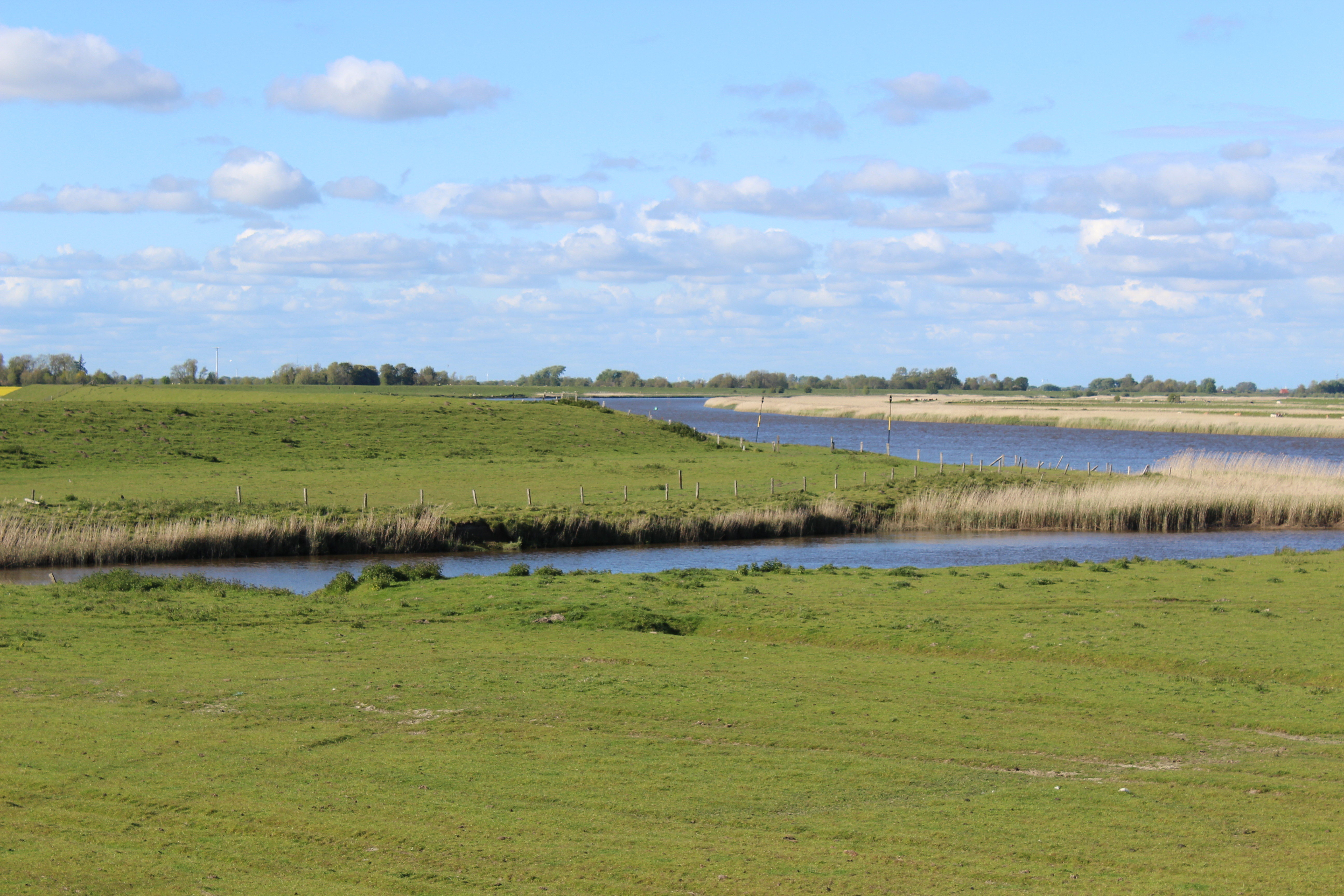 Naturschutzgebiet „Oldensworter Vorland“ im Kreis Nordfriesland, Hemmerdeich, Blick auf die Eider